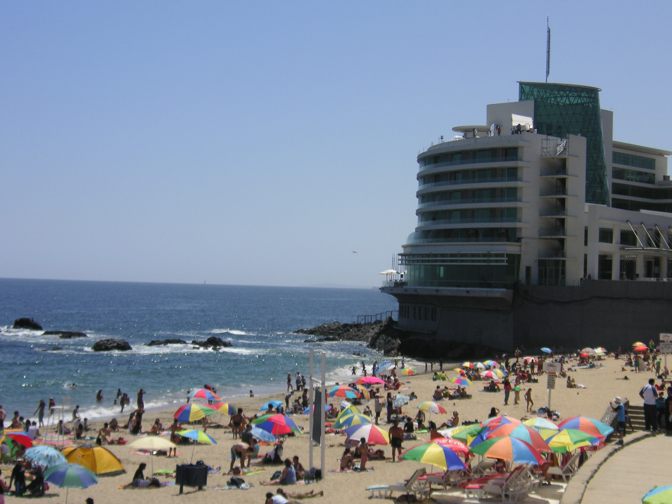 Blog Post